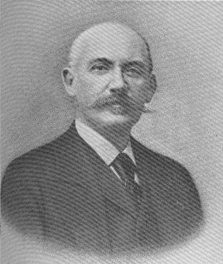 portrait de Robert de Lasteyrie.